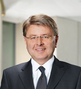 Man sieht das offizielle Pressefoto von Theodor Weimer, Sprecher des Vorstands der HypoVereinsbank - UniCredit Bank AG, Country Chairman Germany und Mitglied des Executive Management Committee der UniCredit. Er steht in einem Foyer.